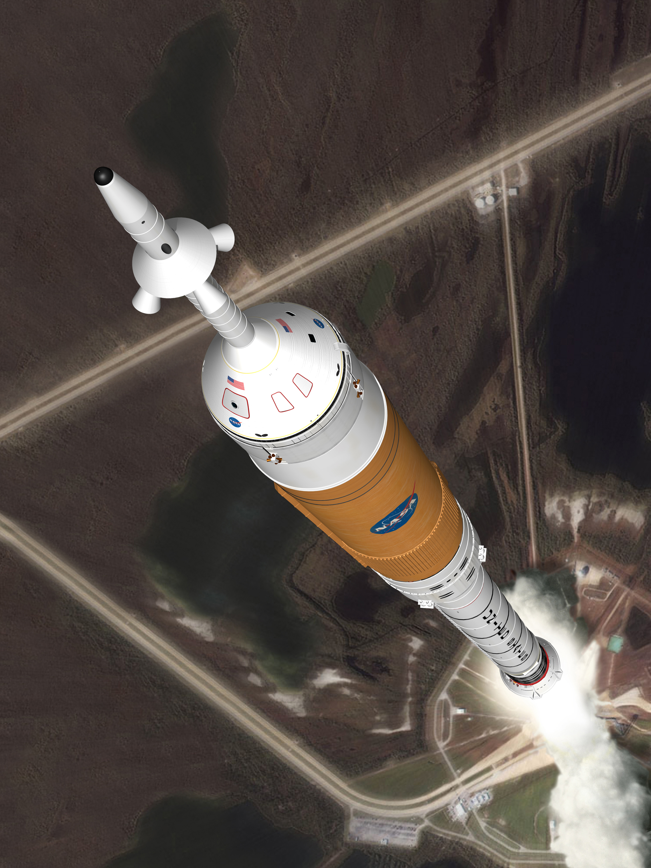 Ares I launch (concept image)